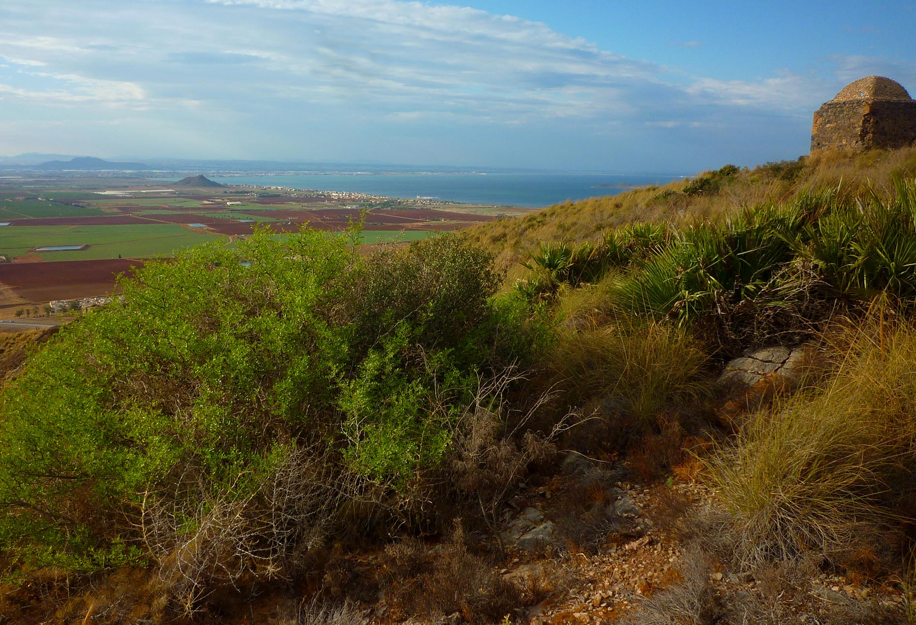 Cabezo de San Ginés, espacio protegido en el entorno del Mar Menor, Cartagena (España). En primer término un ejemplar de azufaifo (Ziziphus lotus).